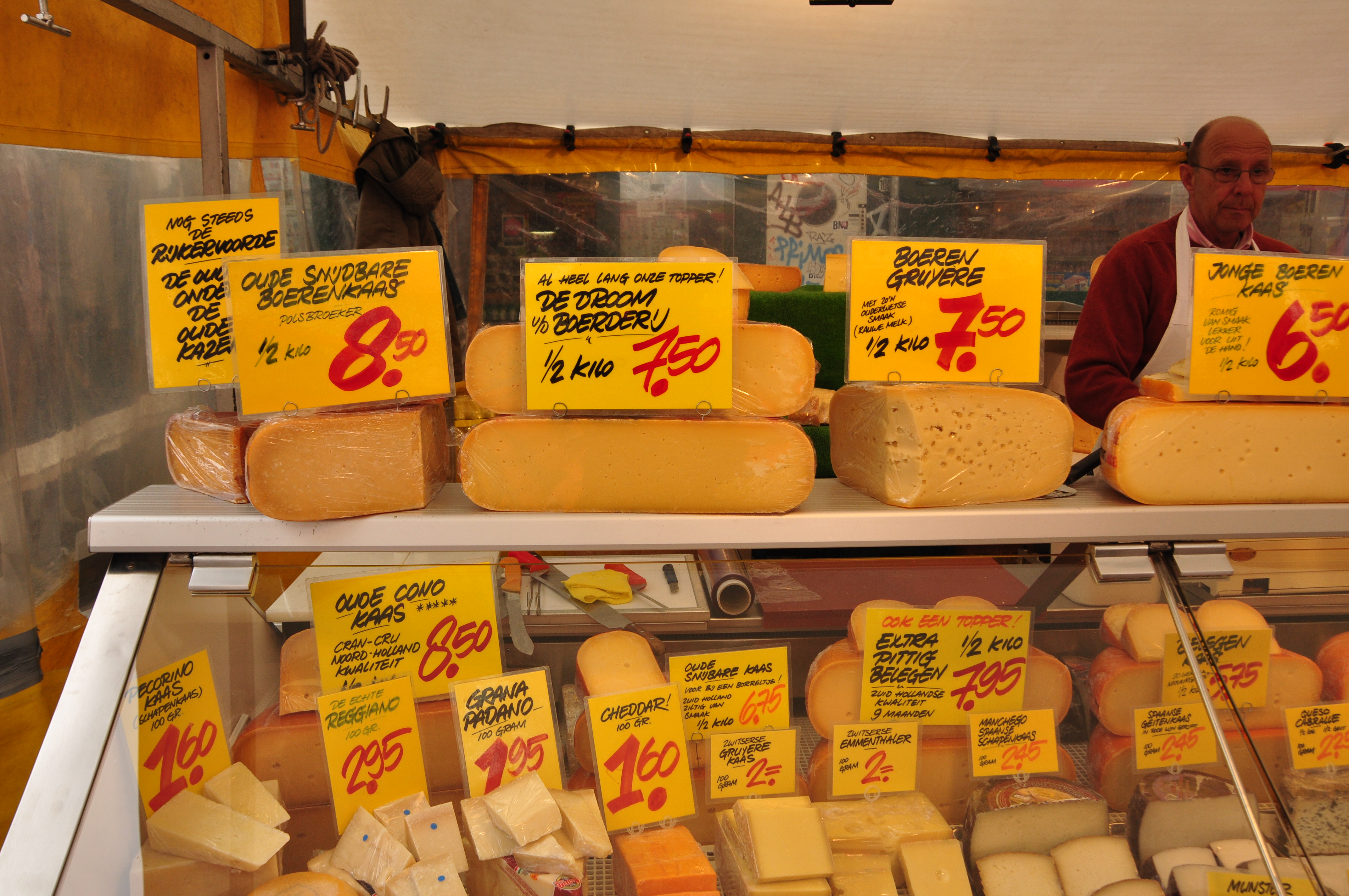 Bart Kaas Albert Cuypmarkt Amsterdam